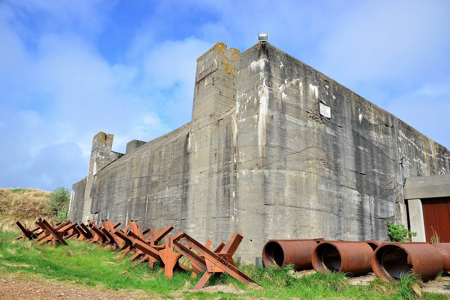 Atlantikwall-Bunker, Blåvand, Dänemark, Datum/Uhrzeit: 20.05.2013 10:59:54